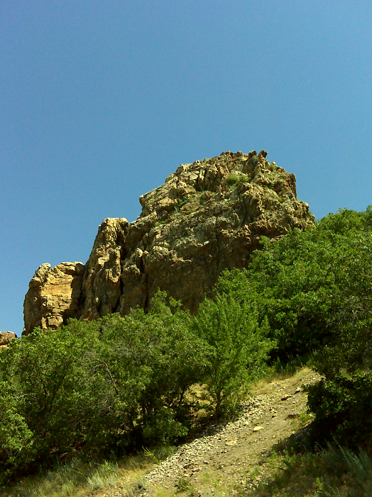 Mountain